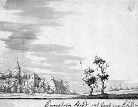 Schets Hongenrenborgh